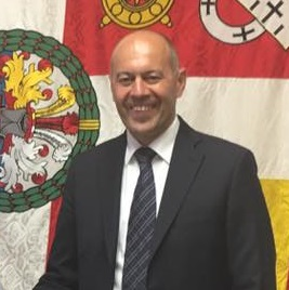 Il colonnello Cristoph Graf, comandante delle guardie svizzere pontificie, mentre riceve la visita della delegazione Gruppo Devoti della Madonna dei Miracoli di Corbetta (MI)